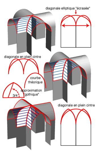 dessin de Utilisateur:Roby Summary genèse de la croisée d'ogives